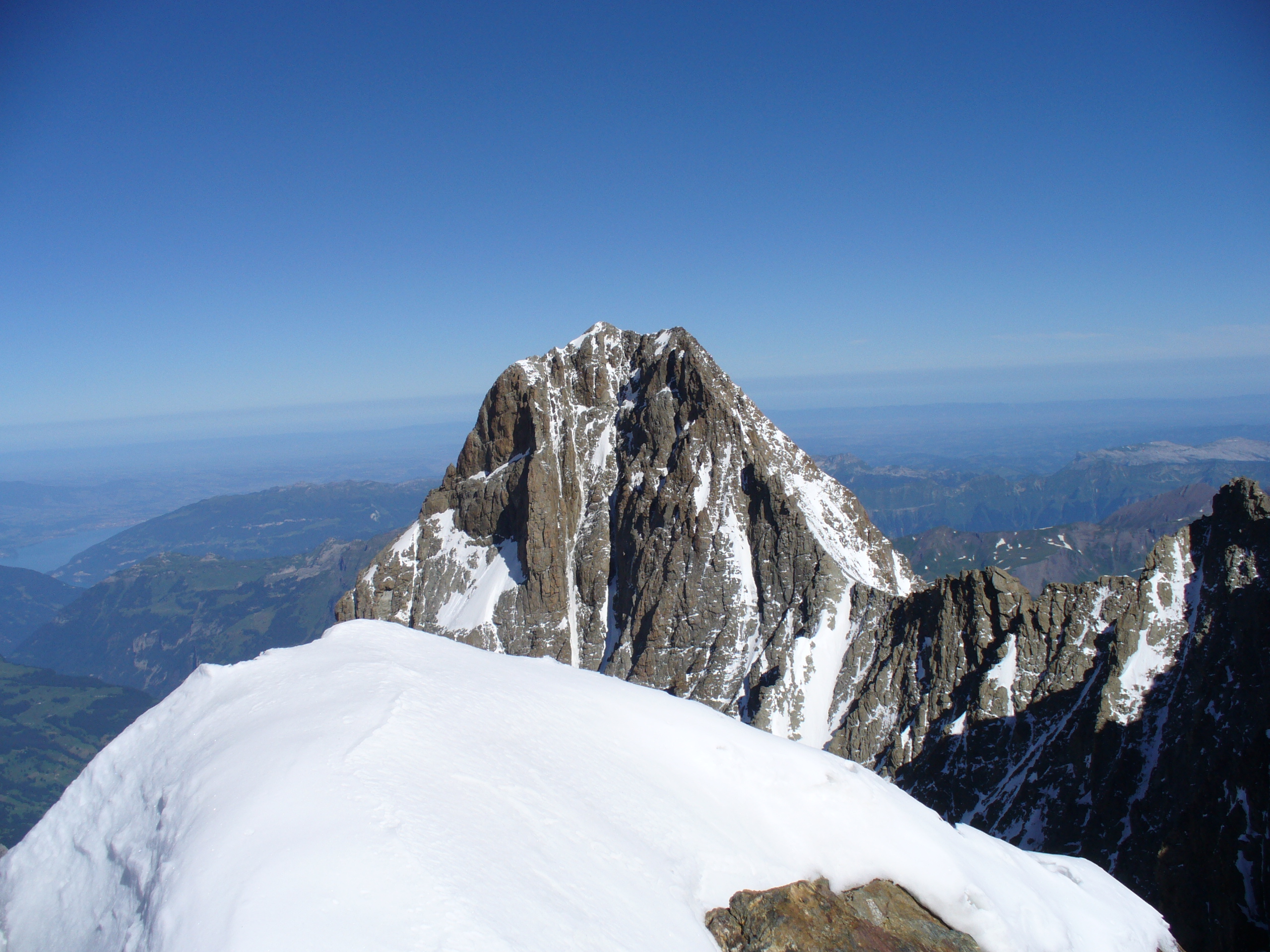 Le Schreckhorn depuis le sommet du Lauteraarhorn